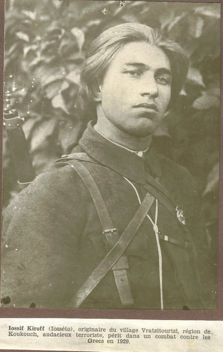 IMRO member Yosif Kirov